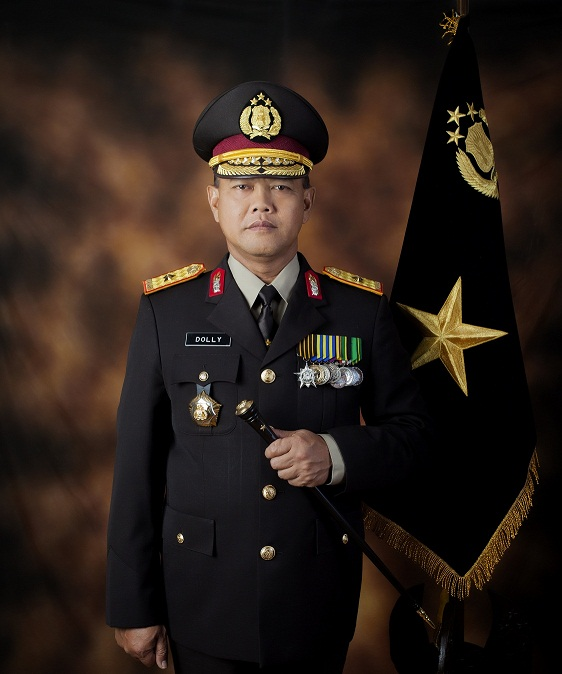 saat menjabat menjadi kapolda Riau